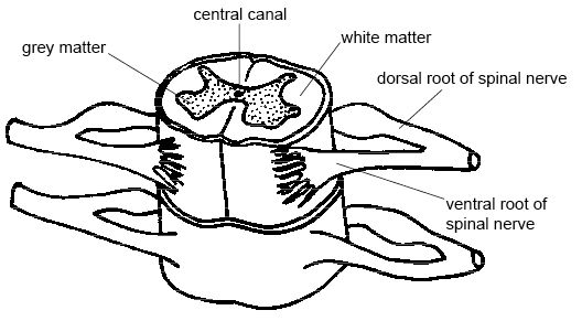 spinal cord.